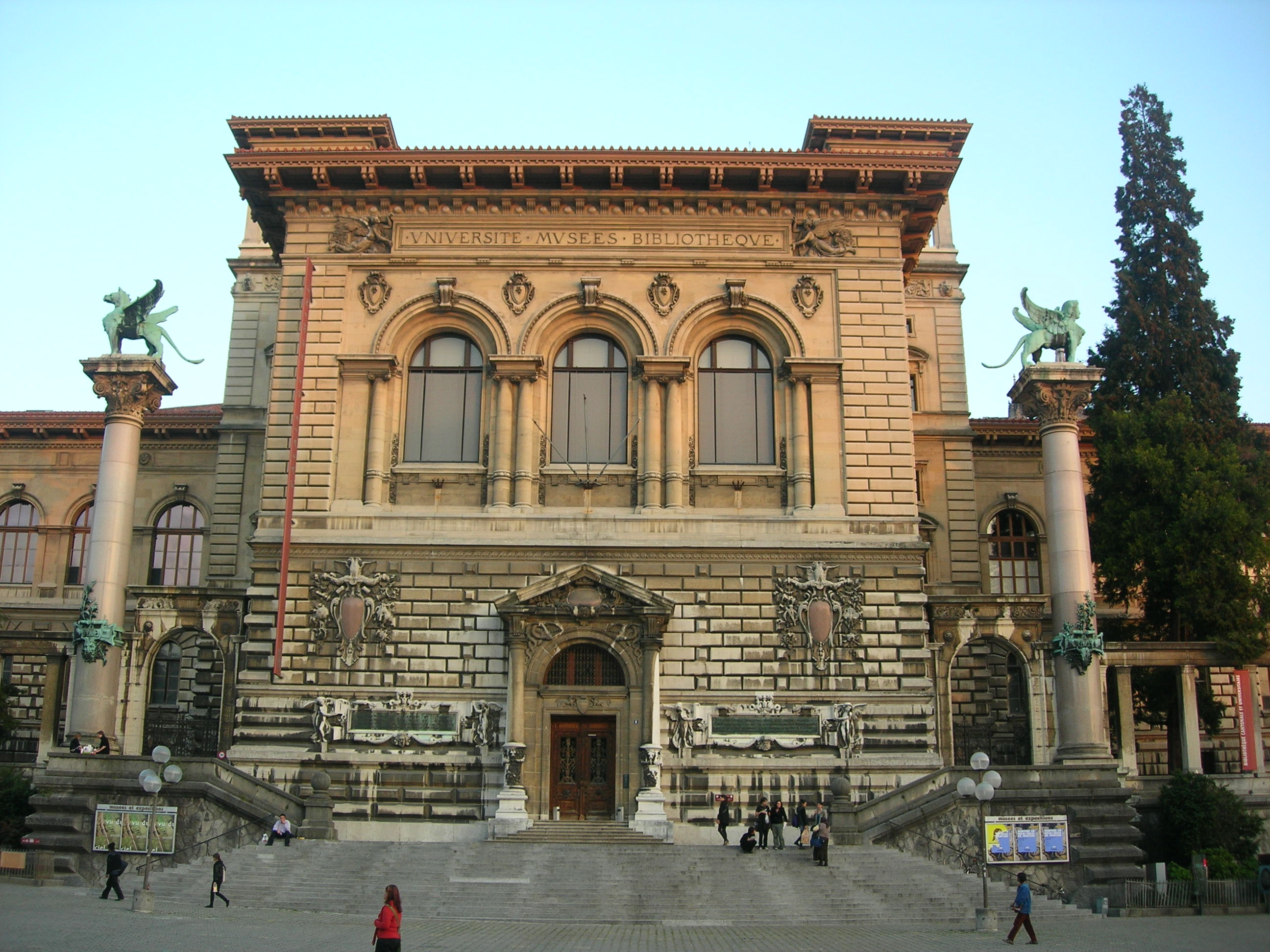 Palais de Rumine, ville de Lausanne (Suisse) : façade partie centrale